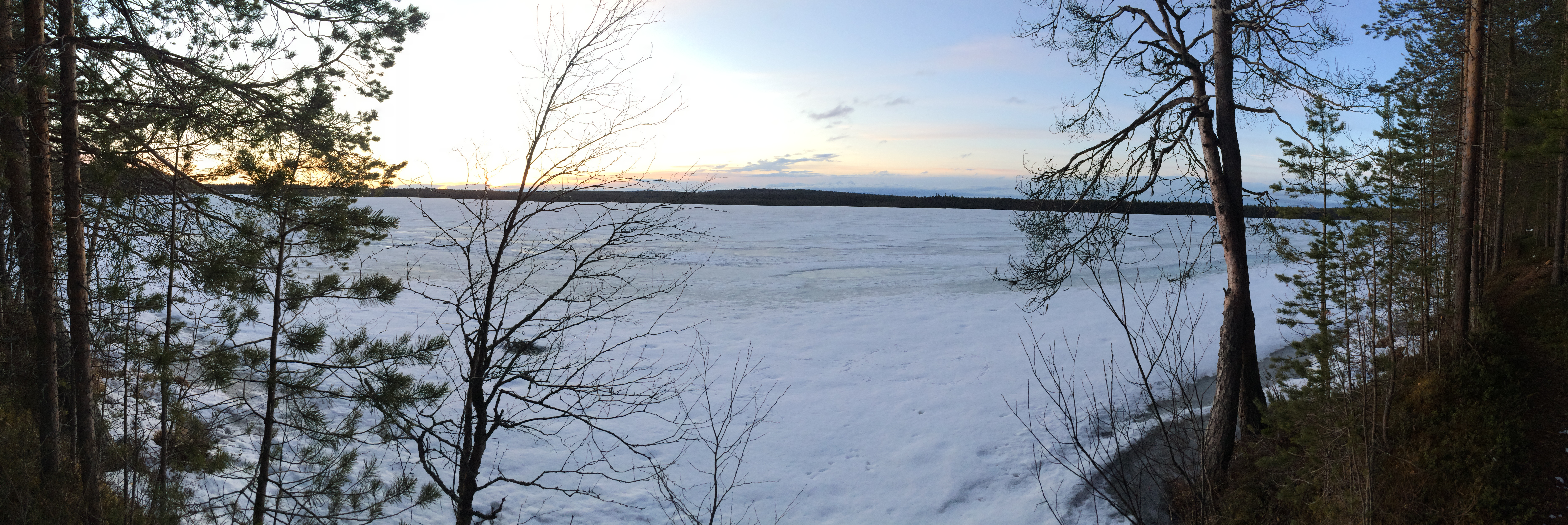 Кешкема